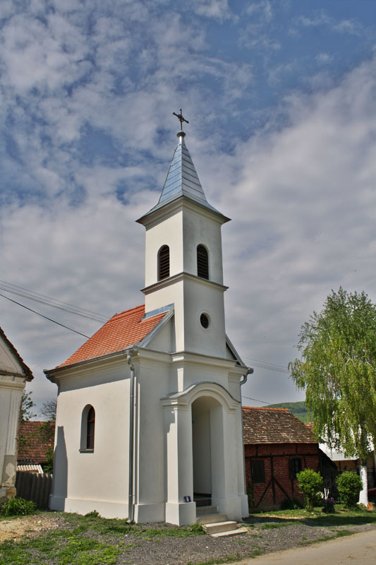 Kapela sv.Nikole Matković Mala